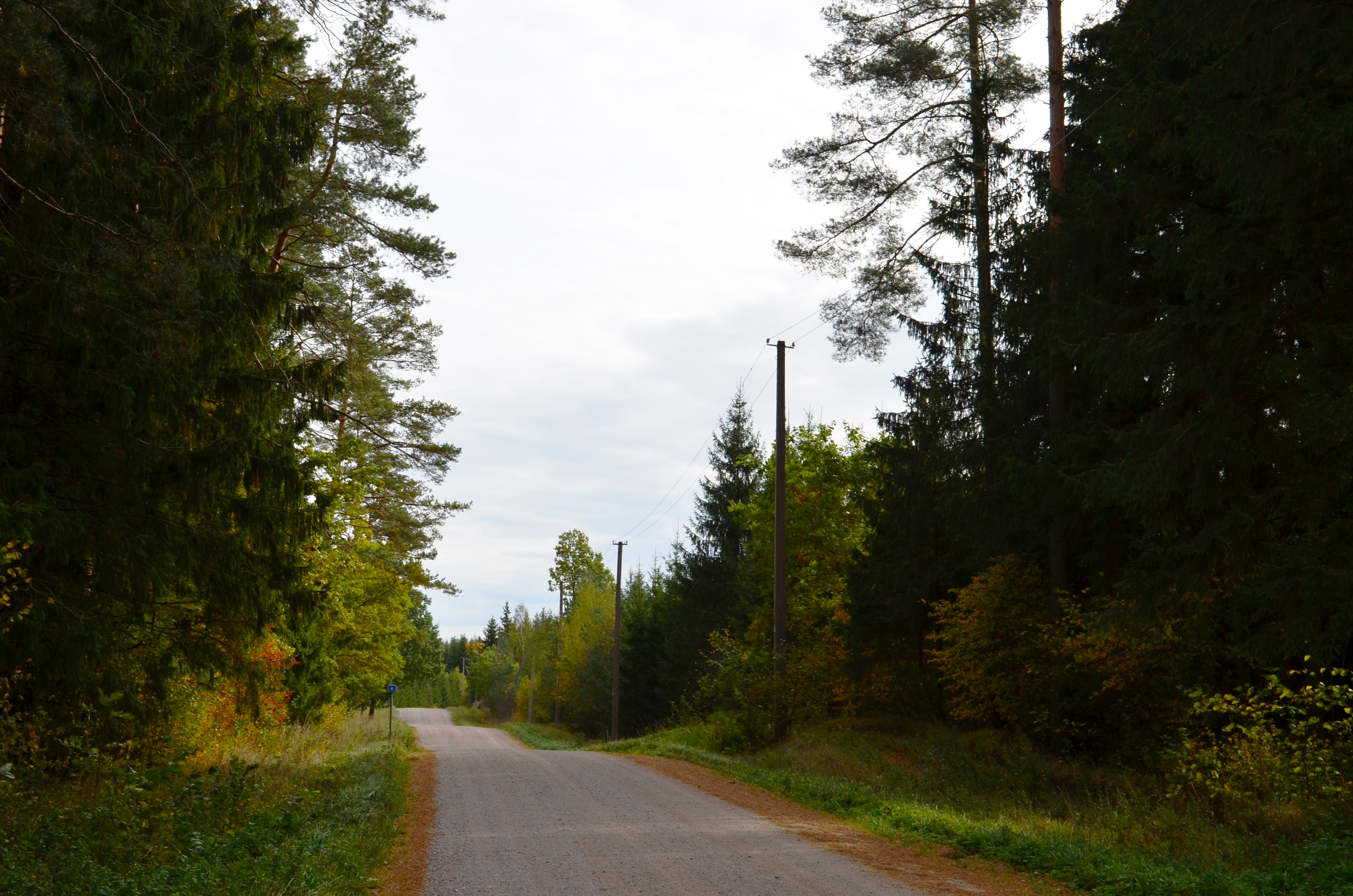 Kuprės miškas šalia Žibuoklių, Kelmės raj.